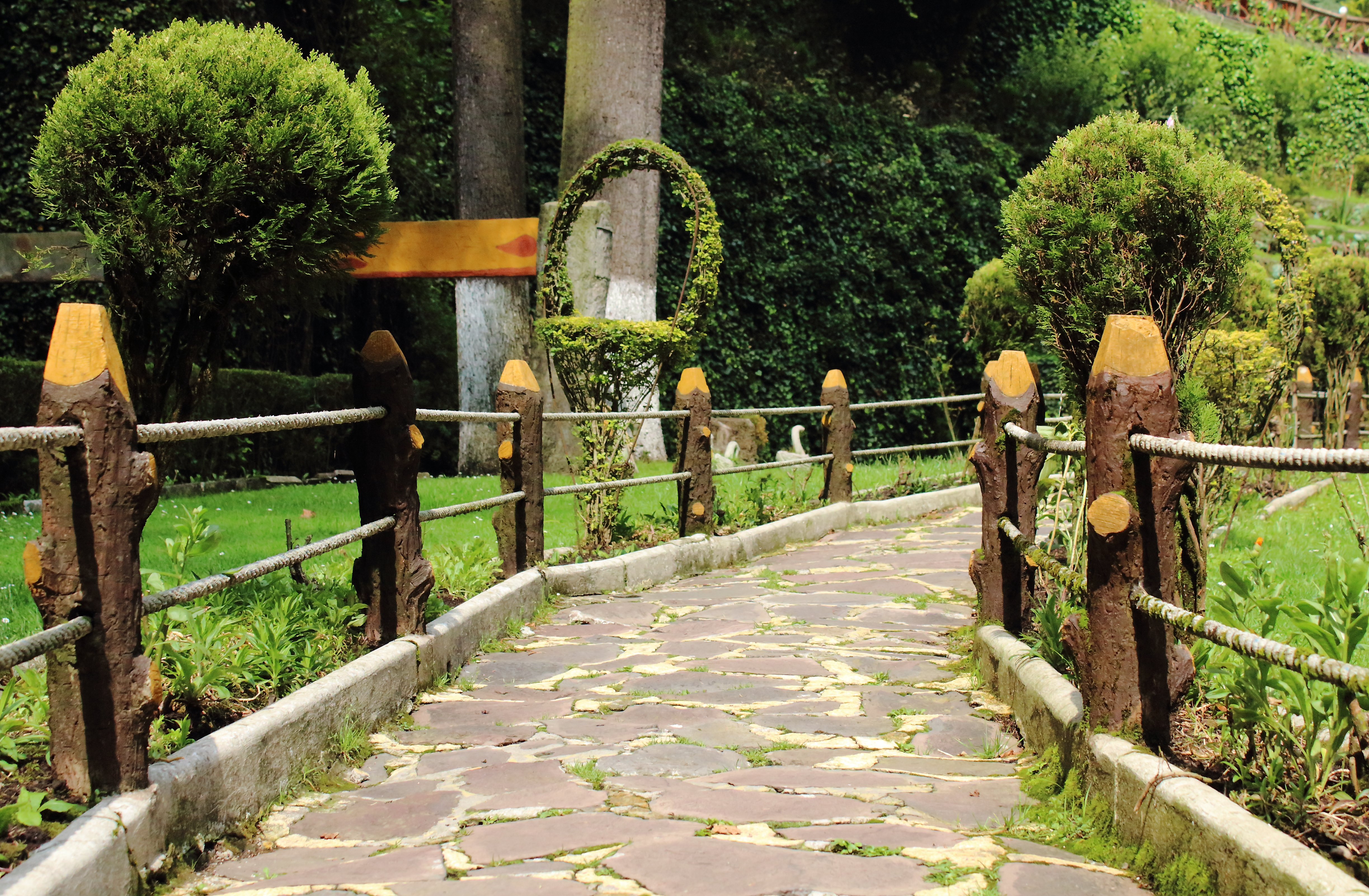 Camino en restaurante "La escondida", Toluca.